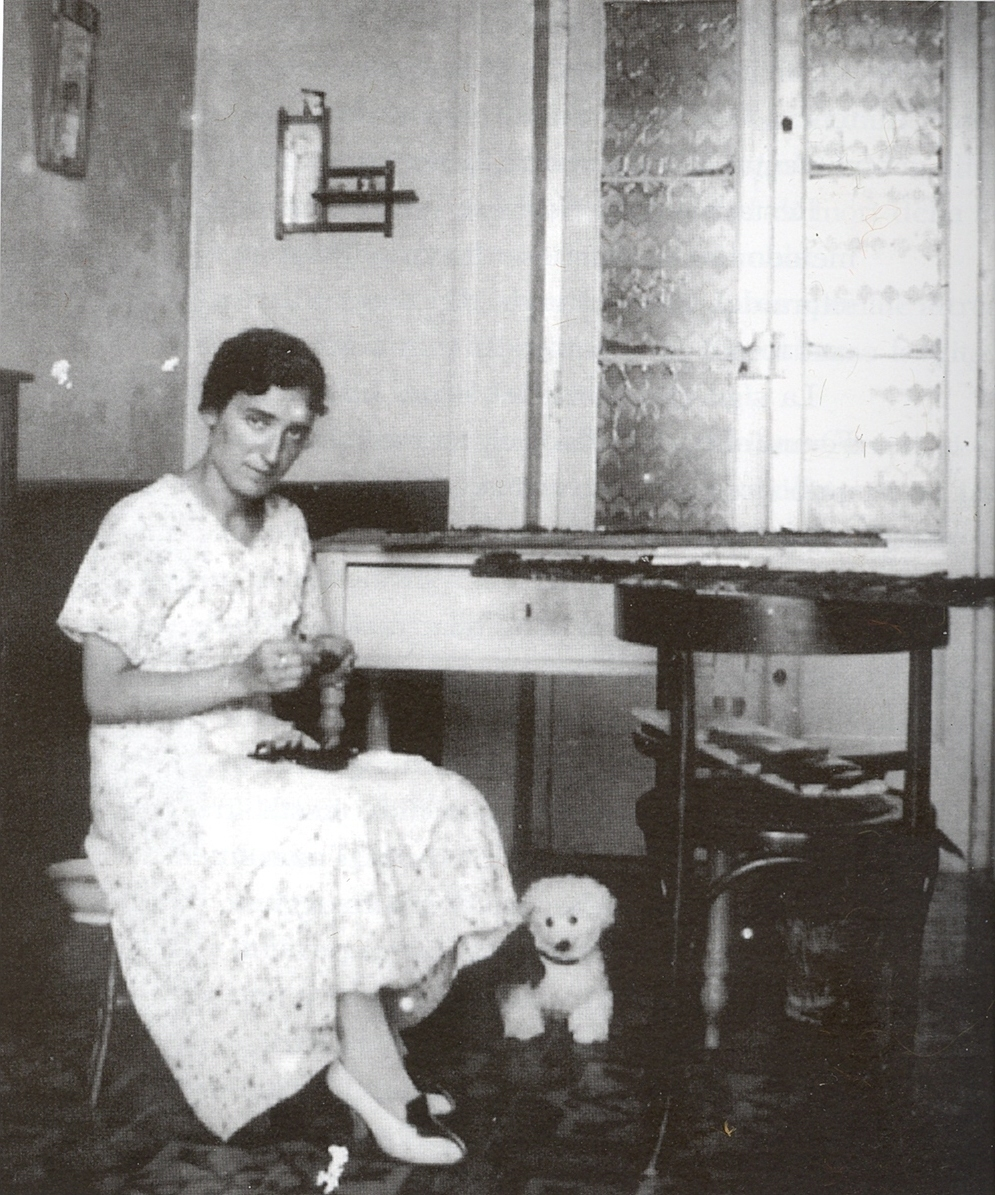 La professoressa Rita Del Bene intenta nell'operazione di stropicciamento del bisso marino, sec. XX secondo quarto. Il bisso e' una sostanza organica secreta da un particolare mitile detto pinna nobilis per ancorarsi ad un sostegno. Questa lanuggine viene raccolta, fatta essiccare e lavorata fino a diventare filo di colore oro impiegato per il ricamo (AS Taranto, Confederazione fascista dei Professionisti ed Artisti di Taranto, fasc. Inventori)